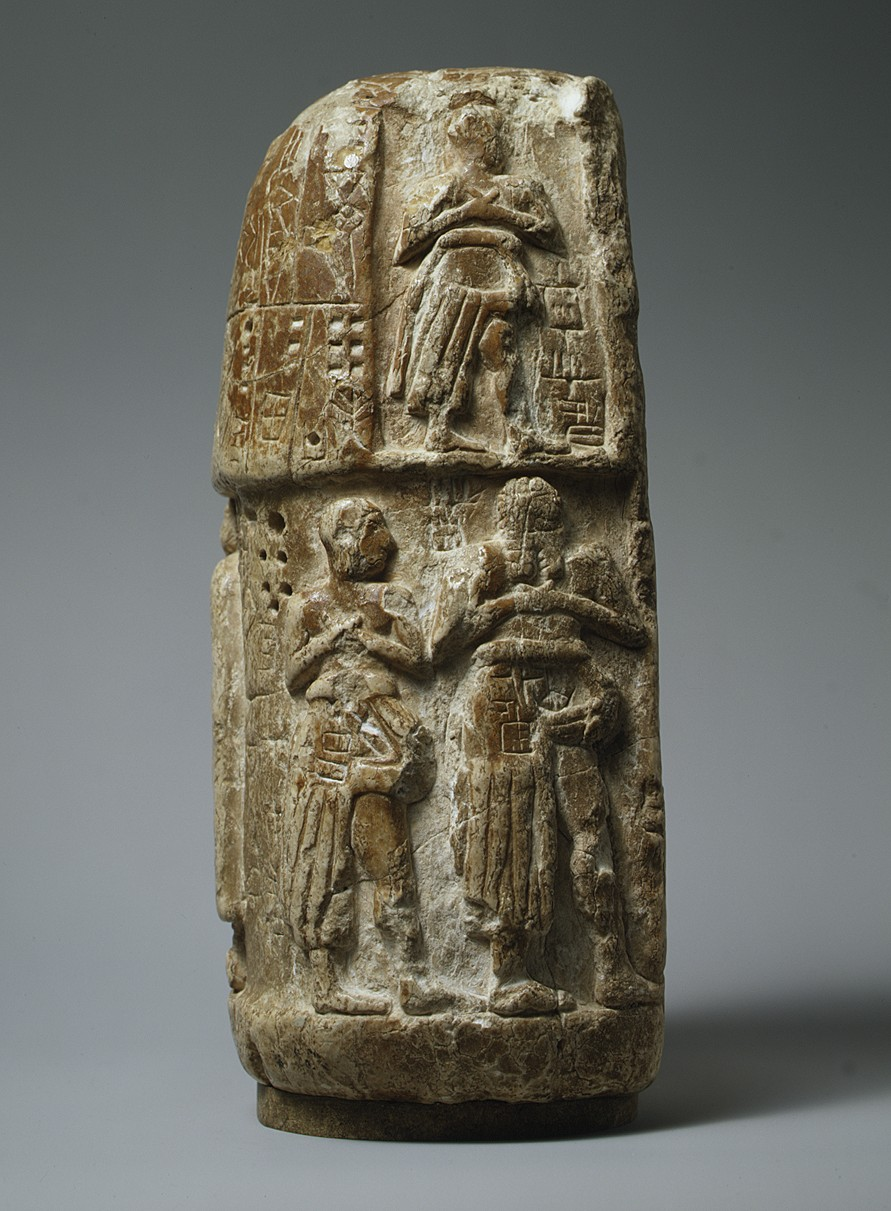 Sumerian; Relief; Stone-Reliefs-Inscribed